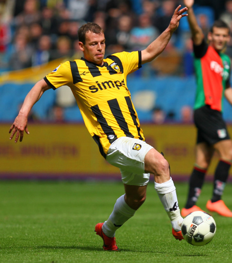 Nick Hofs controleert de bal